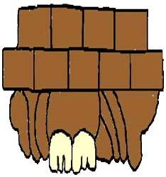 Escudo de Armas o Glifo de Tetepango, Hidalgo